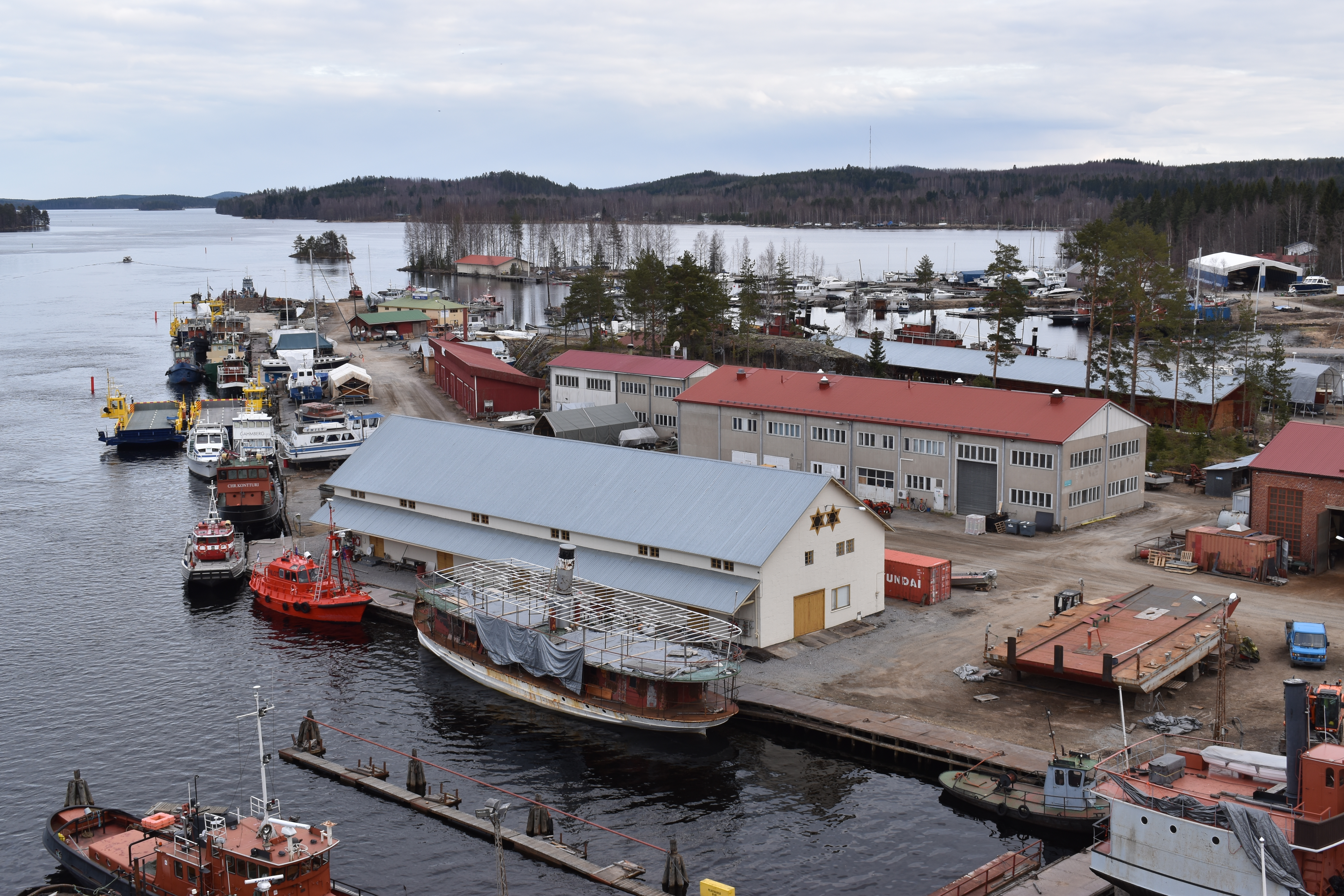 Laitaatsillan telakka.